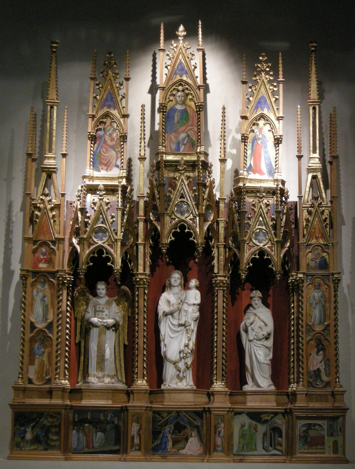 Polittico di priamo della quercia